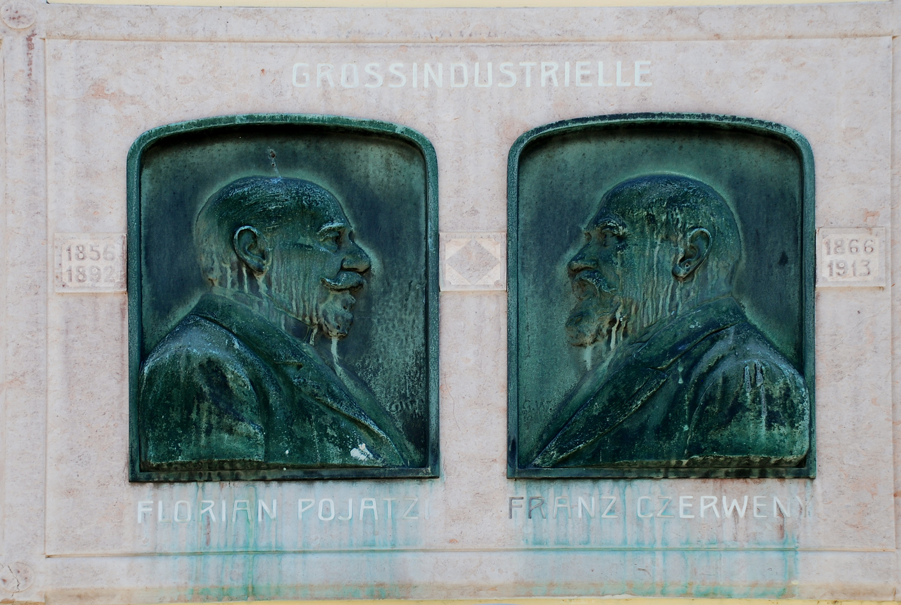 Deutschlandsberg, Steiermark, Österreich: Portraits der Besitzer der ehemaligen Zündholzfabrik SOLO Deutschlandsberg, Florian Pojatzi 1856-1892 und Franz Czerweny 1866-1913